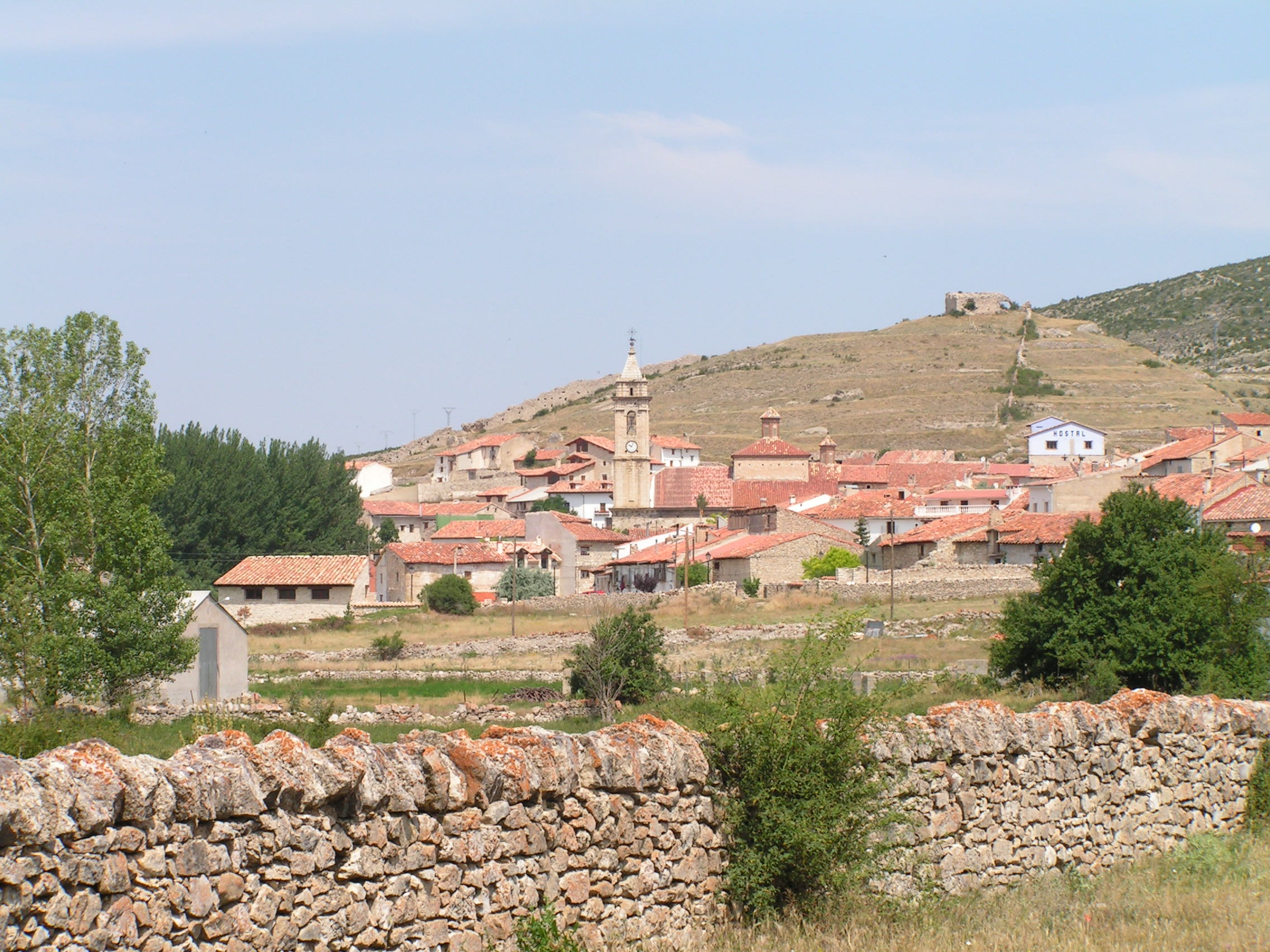 Aragonés: Fortanet dende a ermita de Loreto (Tergüel, Aragón)